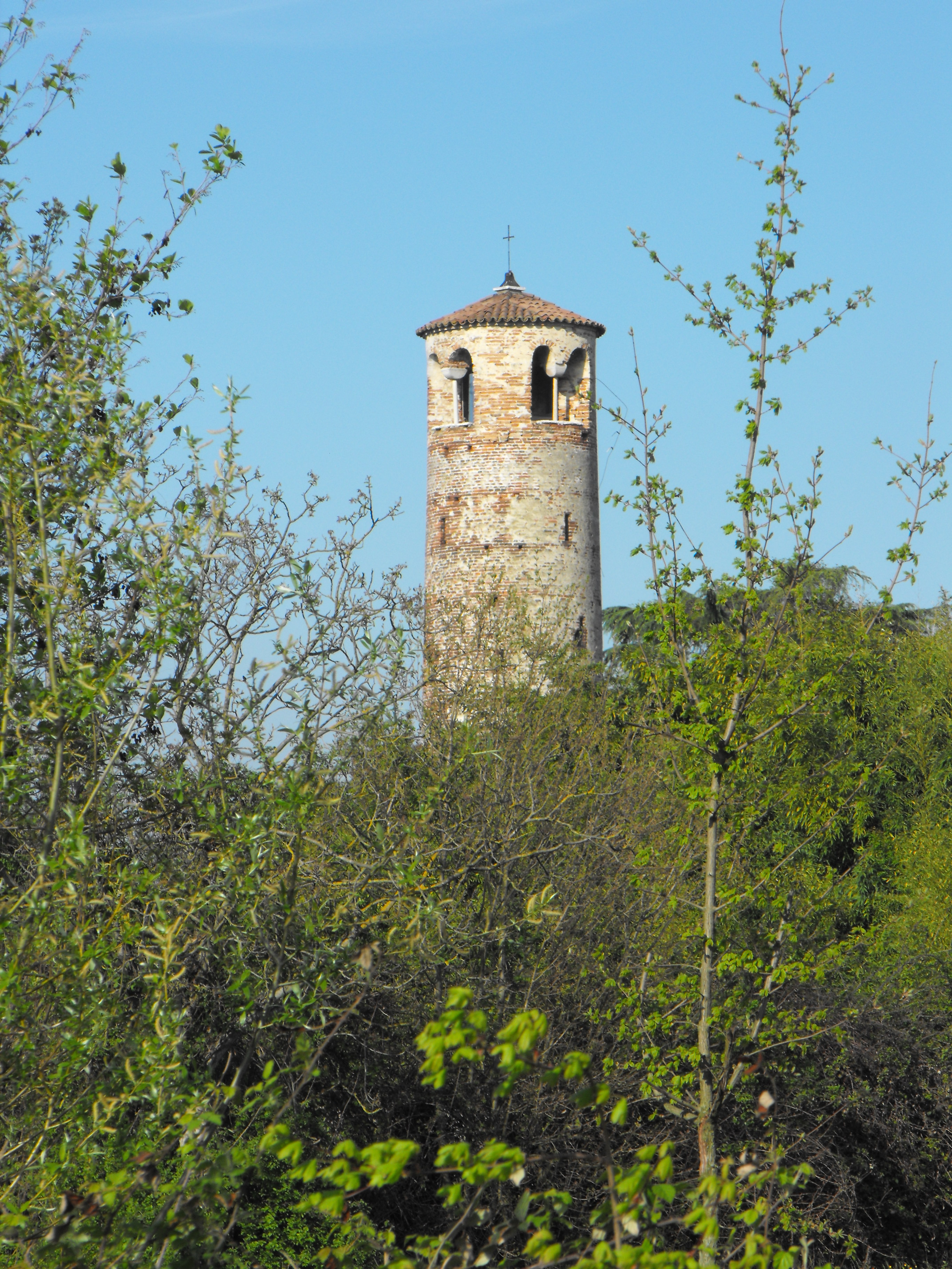 La torre medievale di Tessera (Venezia), campanile della vecchia parrocchiale.